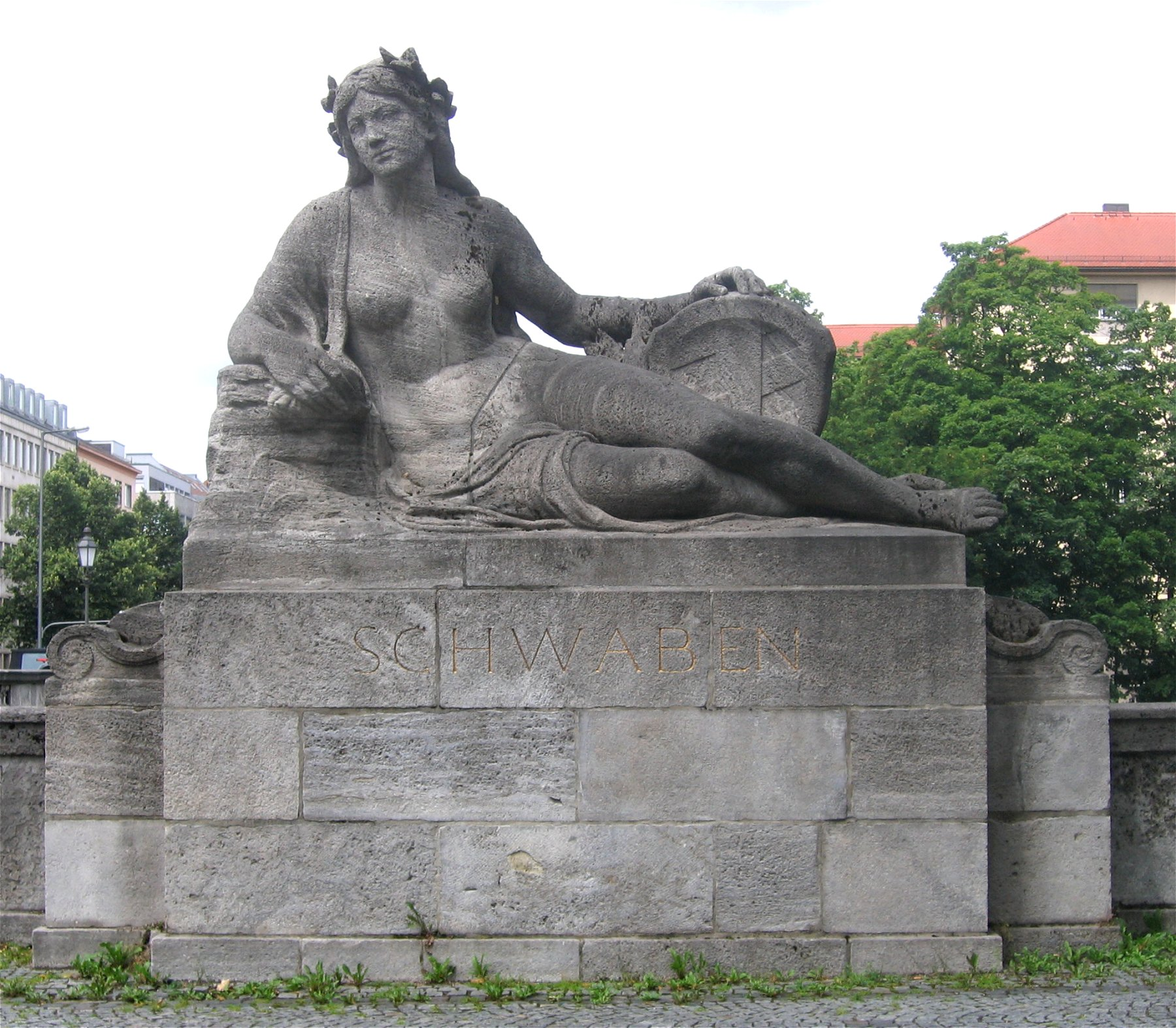 Skulptur "Schwaben" an der Luitpoldbrücke, München